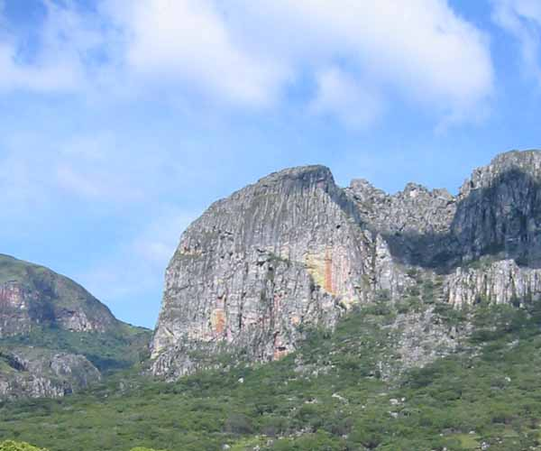 Чиманимани планина, Зимбабве Јан 2004, Аутор Радован Корда, Објављено по изричитом одобрењу аутора